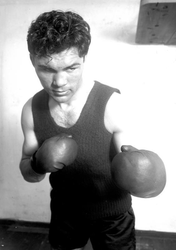 Der deutsche Europa-Schwergewichtsmeister im Boxen Max Schmeling trainiert für den Weltmeisterschaftskampf in Biesental/ Mark Brandenburg. Neueste Aufnahme des deutschen Europa-Schwergewichtsmeisters im Boxen Max Schmeling mit seiner gefährlichen Linken, welche für den Kampf um die Weltmeisterschaft ausschlaggebend sein wird.